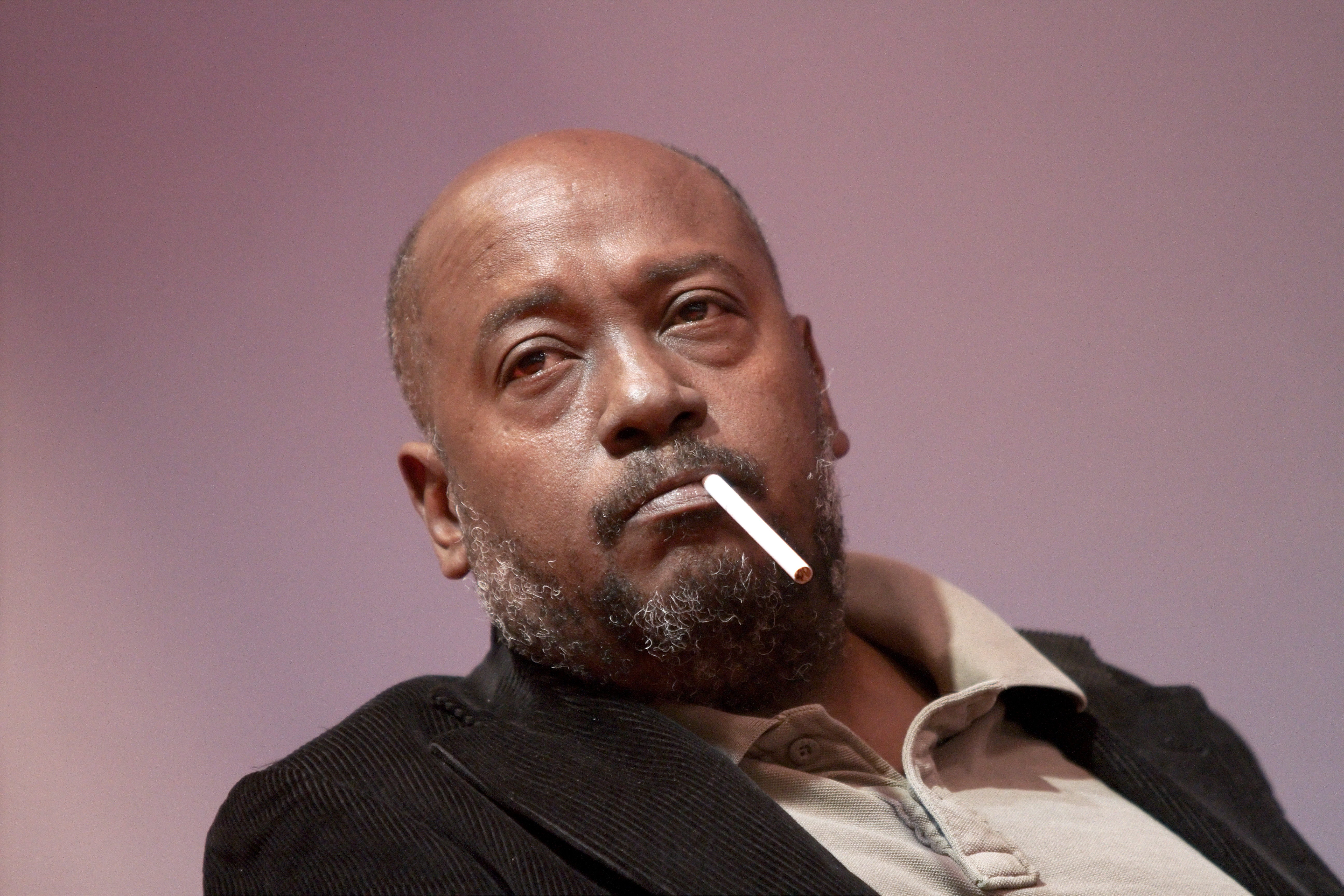 L'auteur Lyonel Trouillot lors du Salon du livre de Paris pour le débat Haïti : c'est la culture qui nous sauvera.